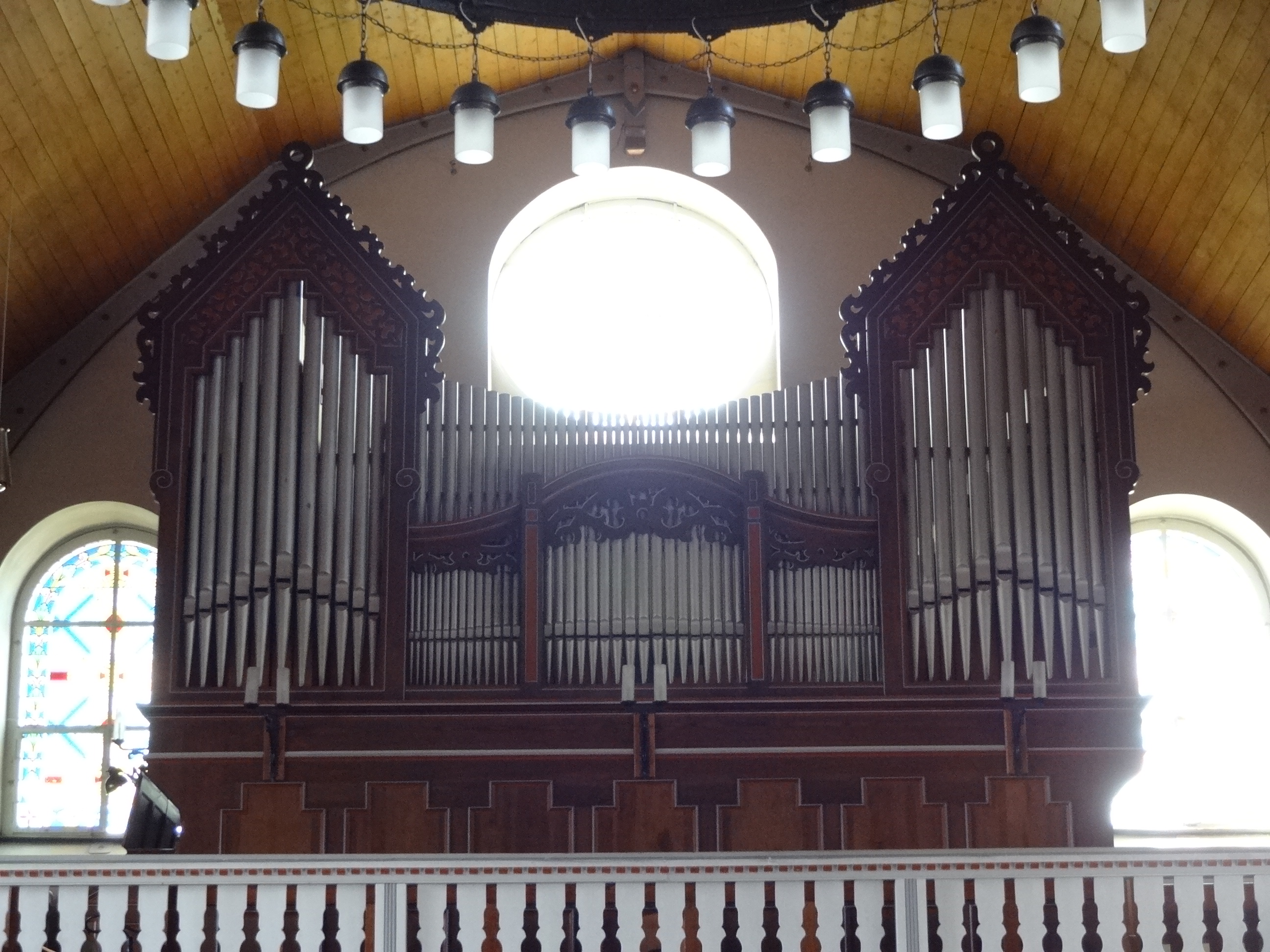 Evangelische Kirche Leihgestern